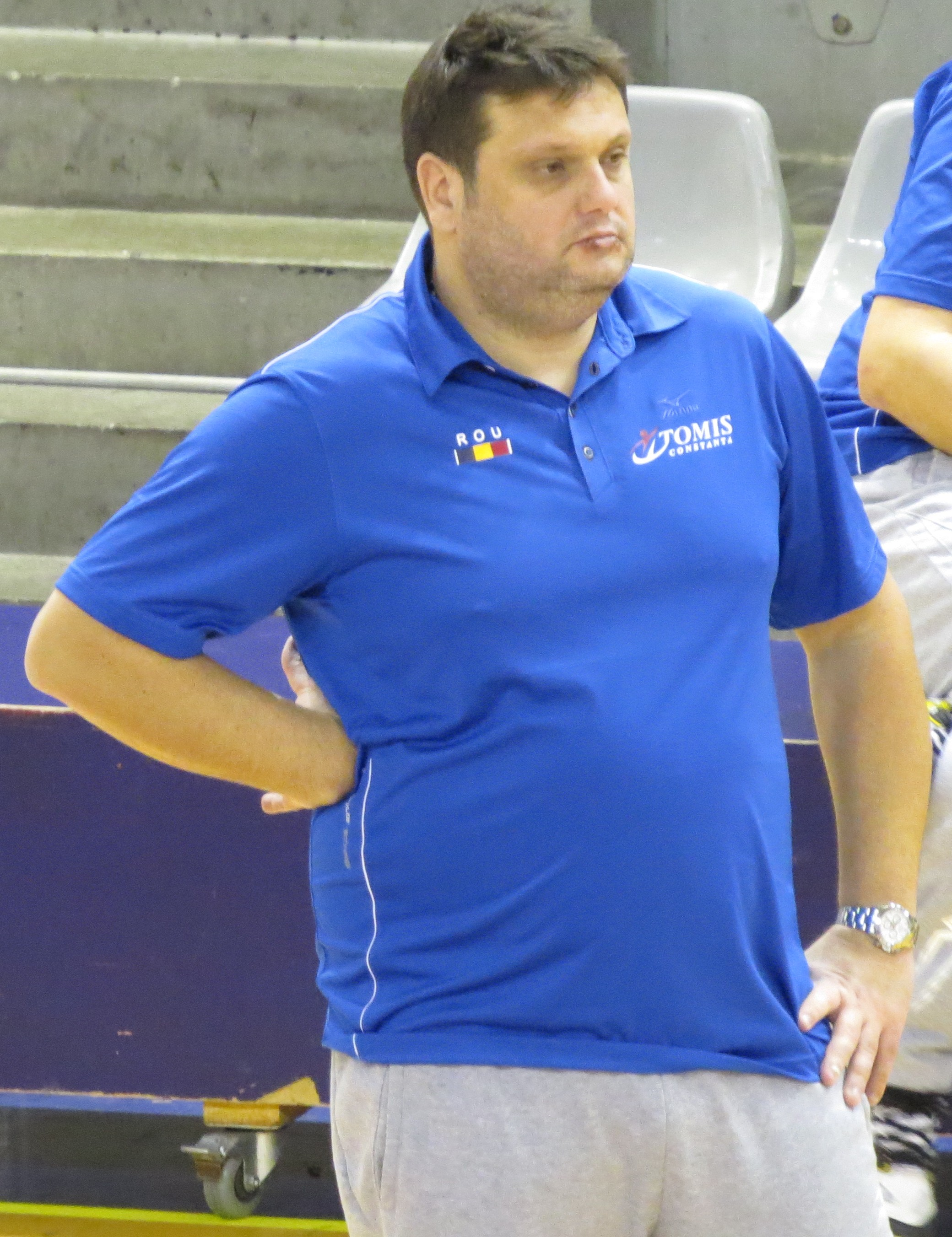 Martin Stoev en 2014